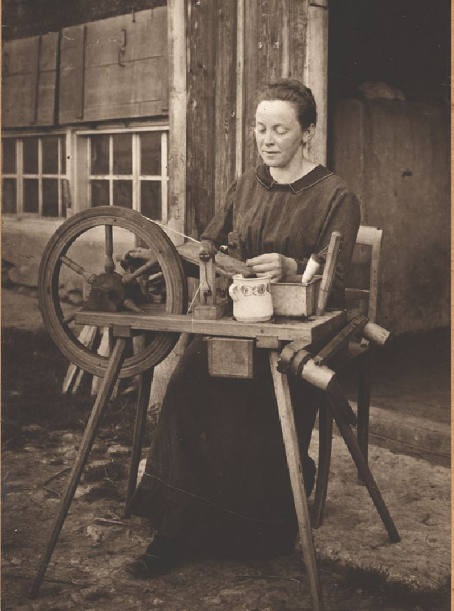 Spulen von Seidenfäden für eine Seidenweberei, Heiden AR, Schweiz 1914